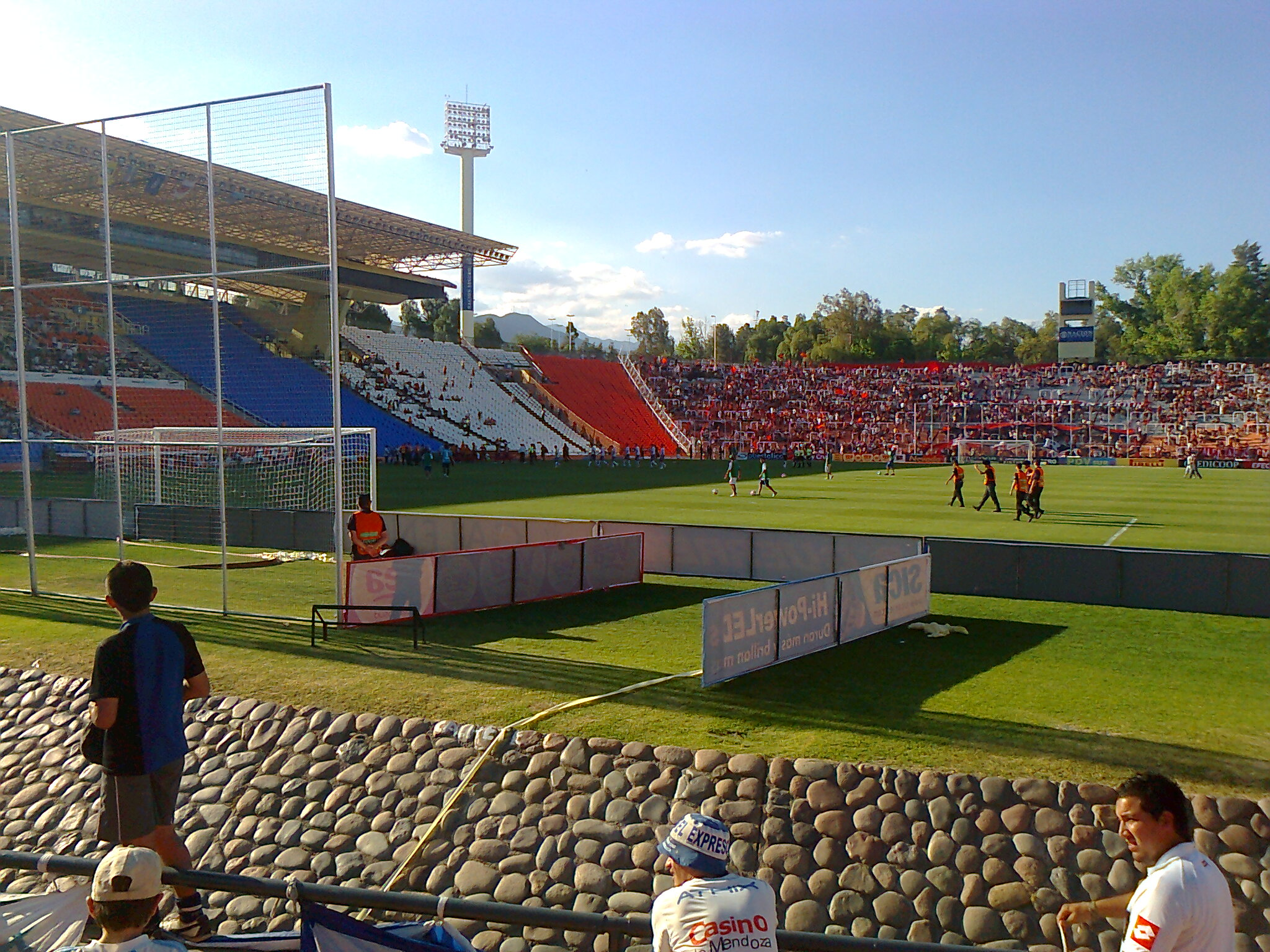 Estadio Malvinas Argentinas durante una disputa entre Newell's Old Boys y Club Atlético Godoy Cruz.